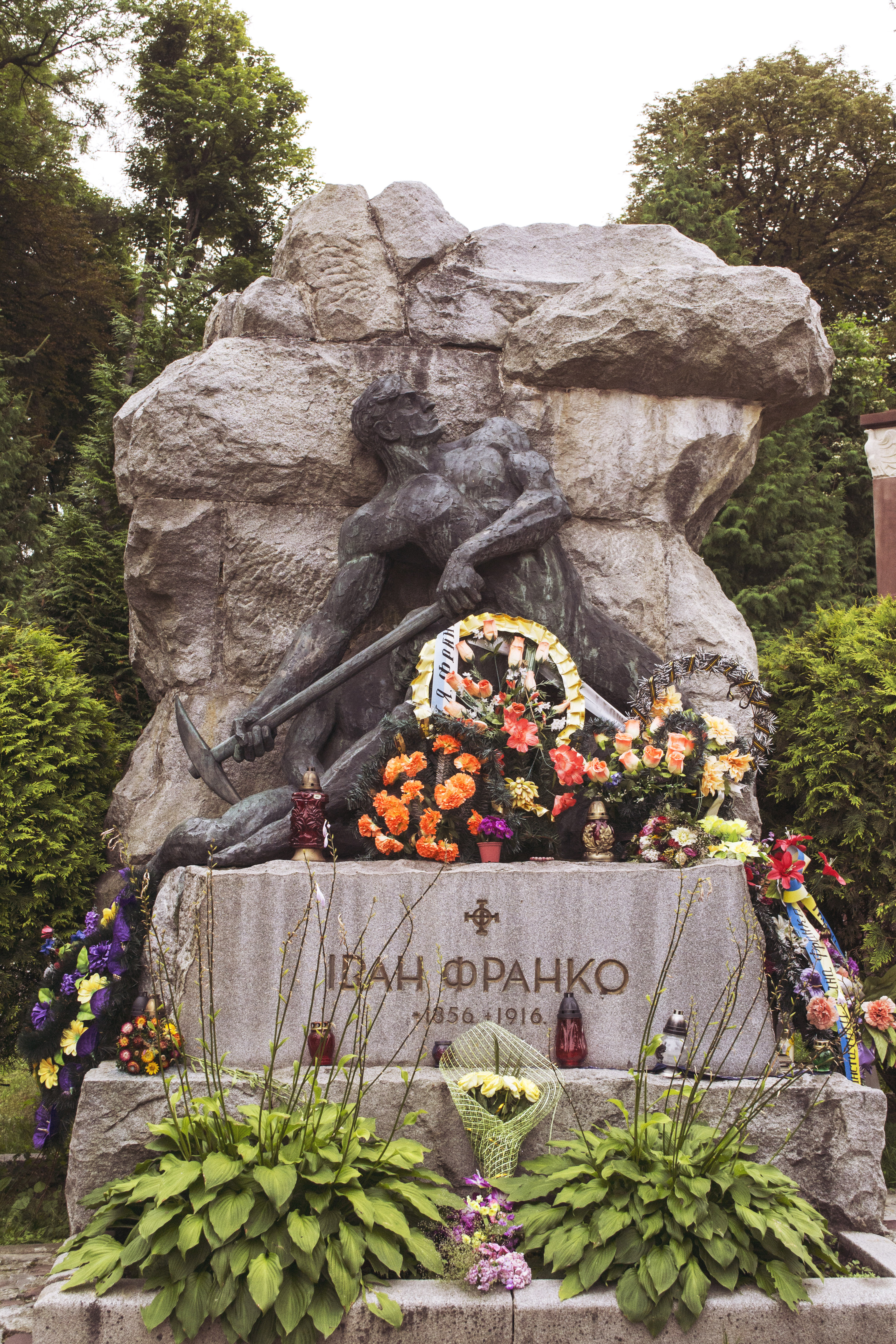 Могила Франка І. Я., видатного українського письменника, поета, вченого, громадського діяча, Львів, вул. Мечнікова, Личаківське кладовище, поле 4